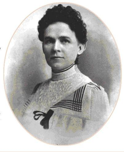 Ella J. Knowles Haskell